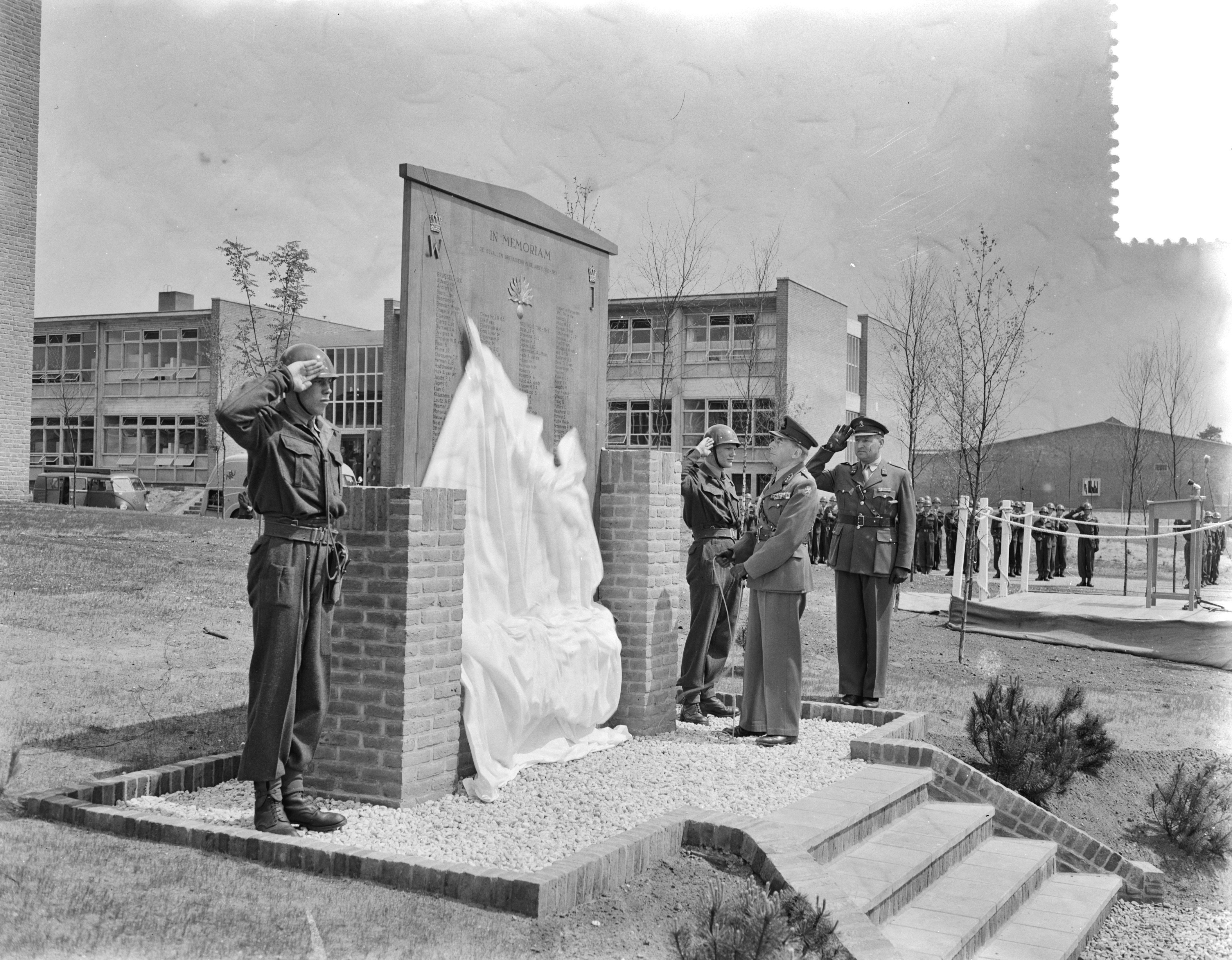 Collectie / Archief : Fotocollectie Anefo Reportage / Serie : [ onbekend ] Beschrijving : Onthulling van het monument in de Oranjekazerne te Schaarsbergen door luitenant generaal J.J.G. baron van Voorst tot Voorst Datum : 1 juli 1955 Locatie : Gelderland, Schaarsbergen Trefwoorden : onthullingen, oorlogsmonumenten Persoonsnaam : Voorst tot Voorst, J.J.G. van Fotograaf : Pot, Harry / Anefo, [onbekend] Auteursrechthebbende : Nationaal Archief Materiaalsoort : Negatief (zwart/wit) Nummer archiefinventaris : bekijk toegang 2.24.01.04 Bestanddeelnummer : 907-2124